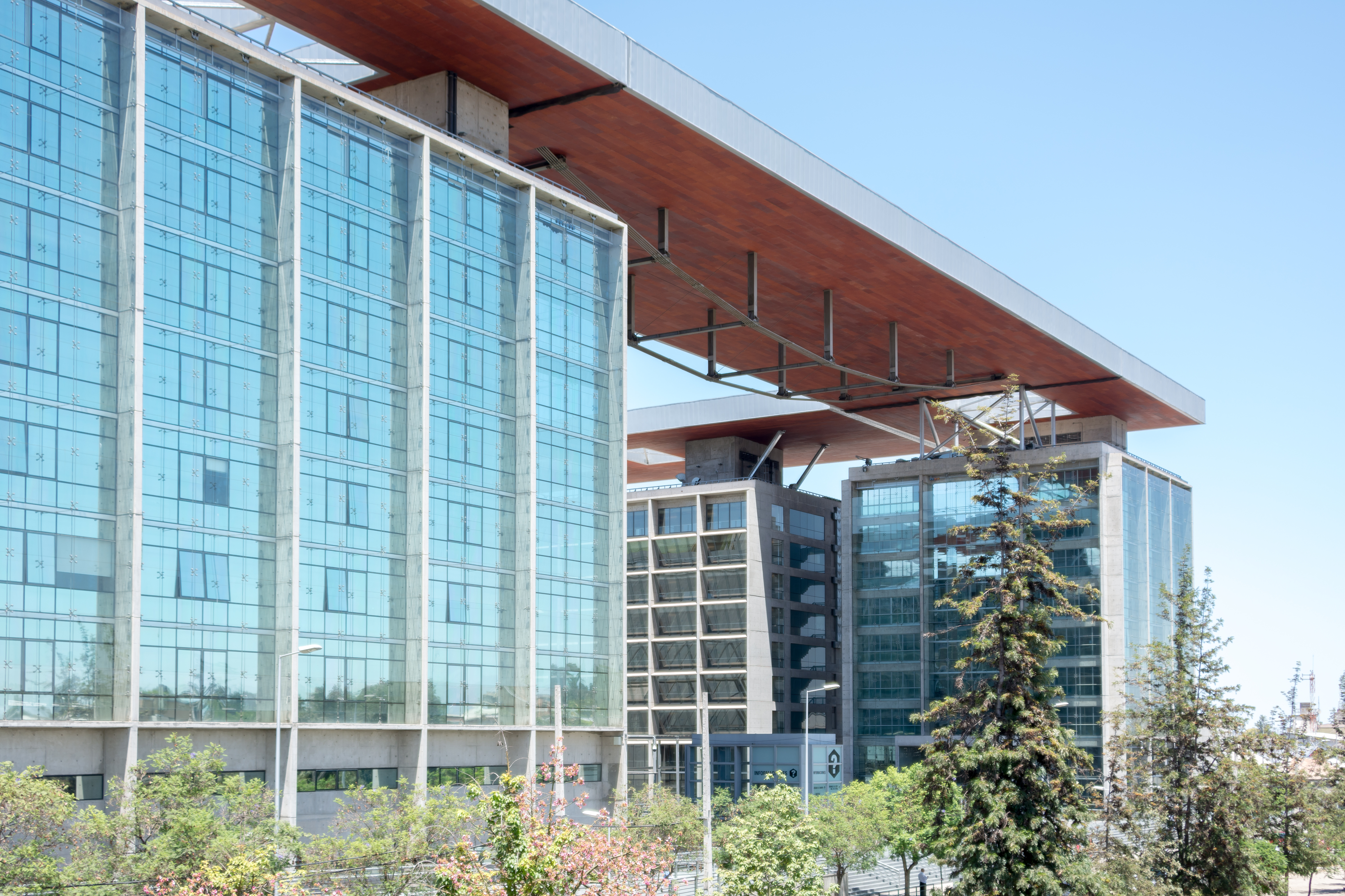 Centro de Justicia, Santiago, Región Metropolitana de Santiago, Chile